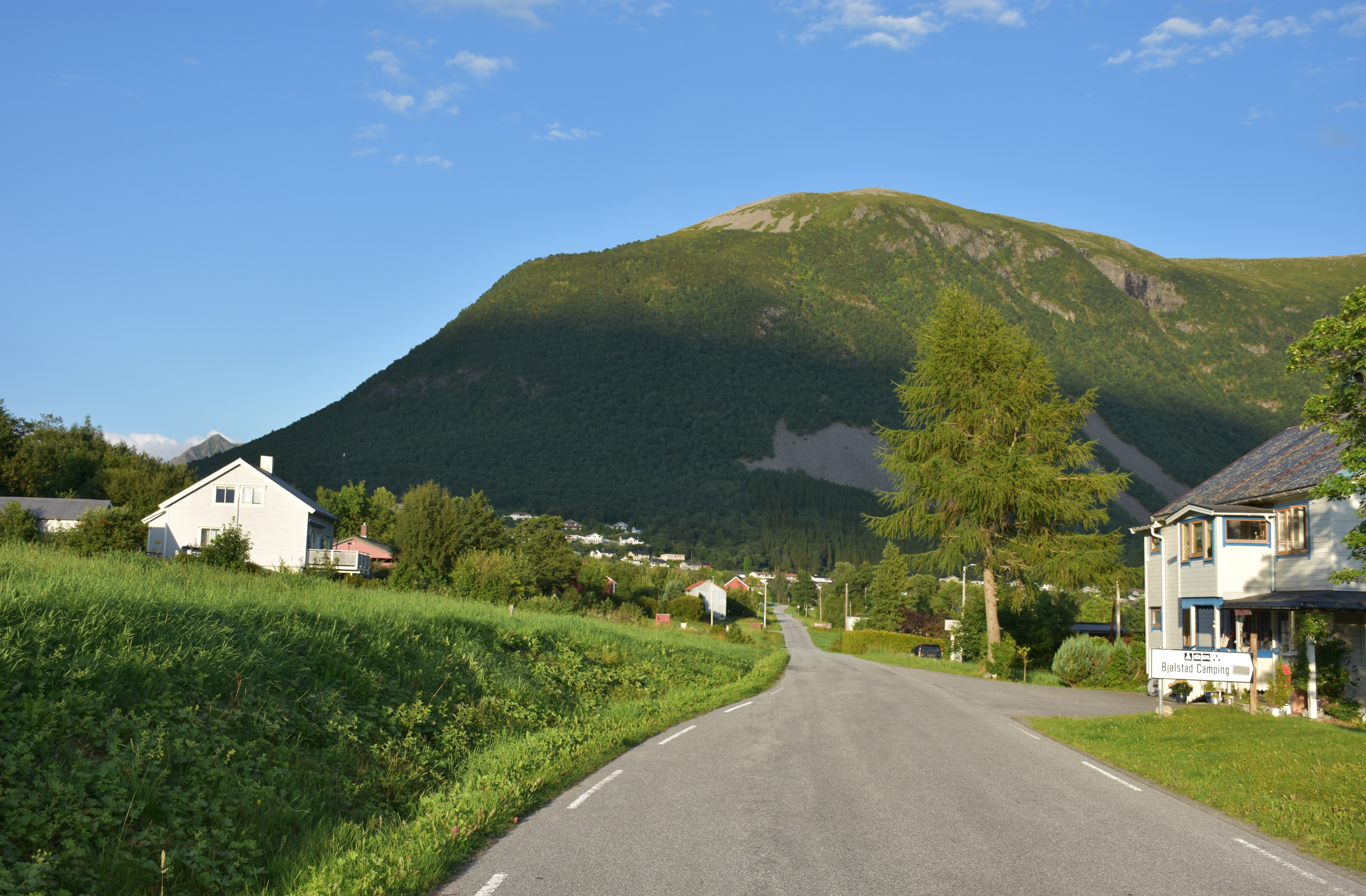 Kolbergvegen (fylkesvei 229)